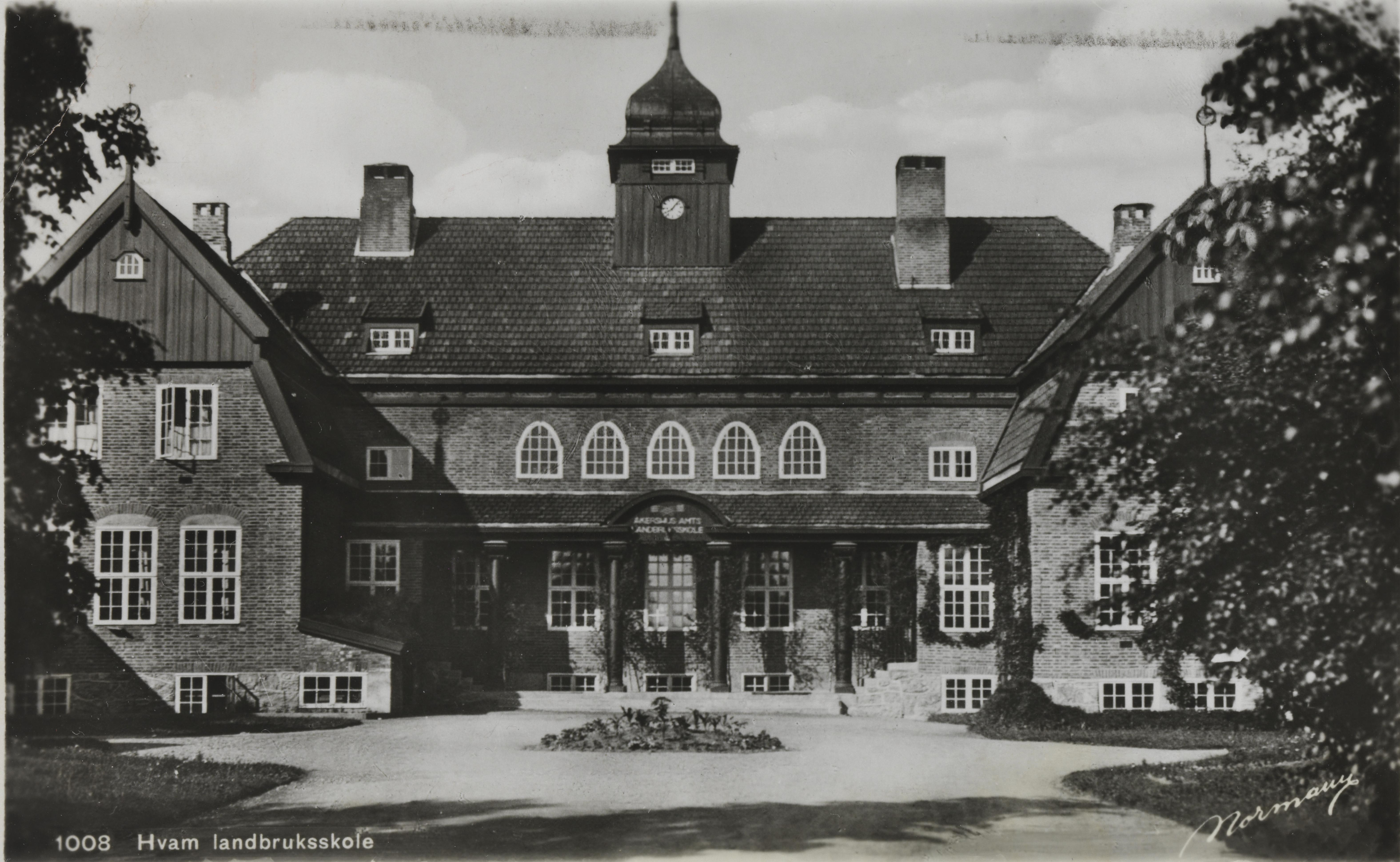 Bildet er hentet fra Nasjonalbibliotekets bildesamling Hvam,Hvam videregående skole, Nes, Akershus